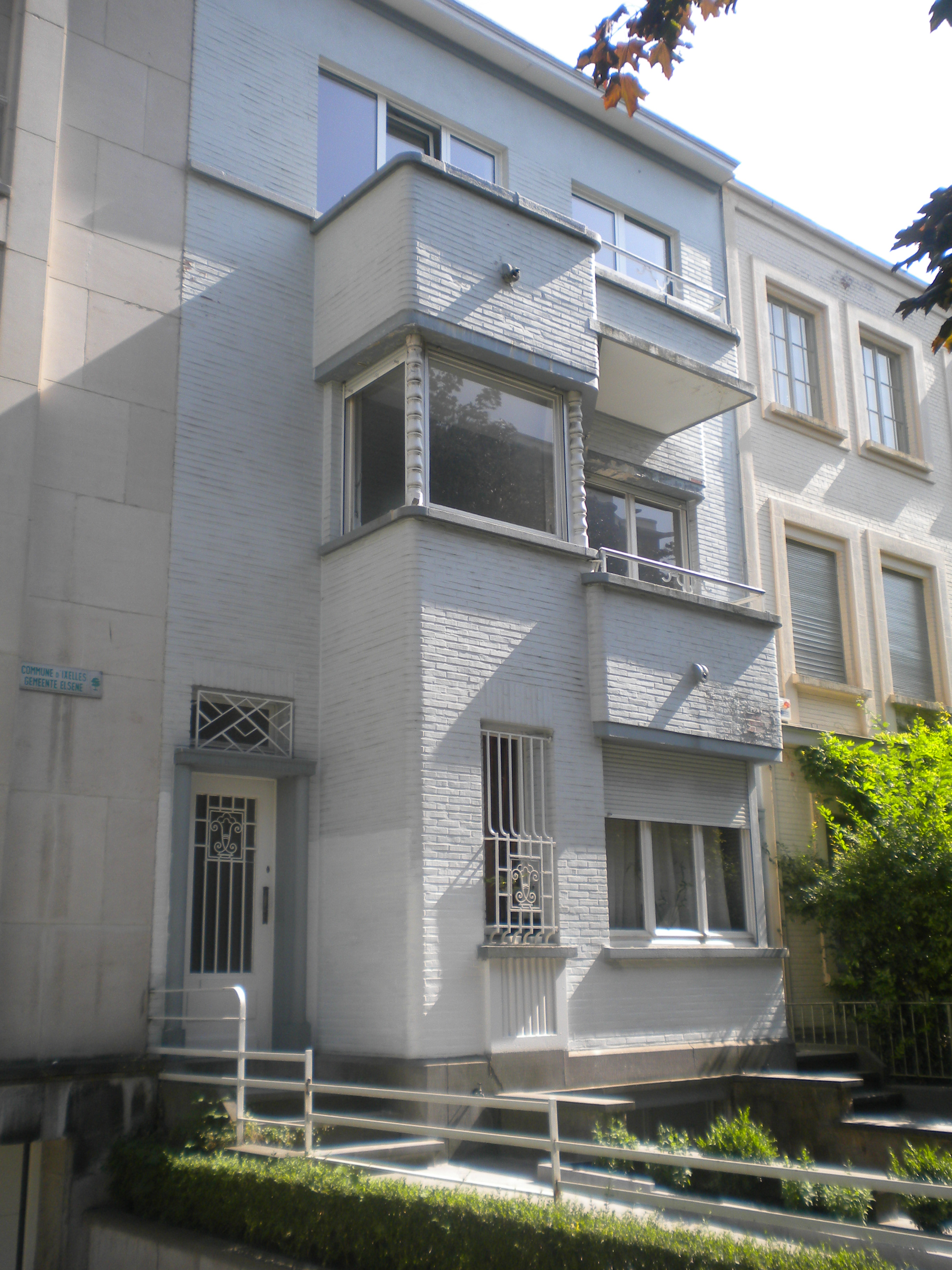 Studio-atelier d'André Franquin avenue du Brésil à Ixelles.